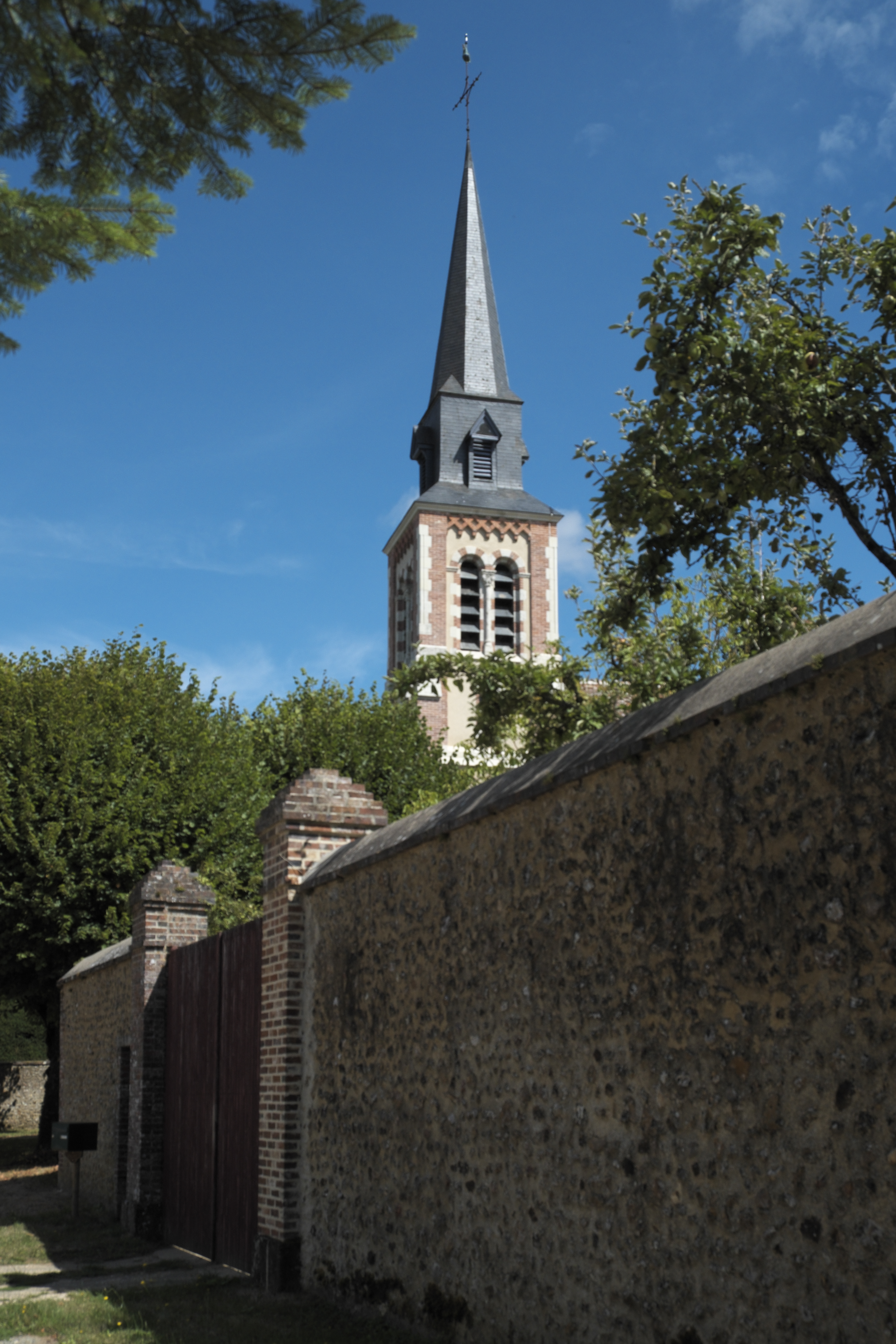 Kirche Saint-Agil und Saint-Fiacre in Saint-Agil im Département Loir-et-Cher (Centre-Val de Loire/Frankreich), Kirchturm